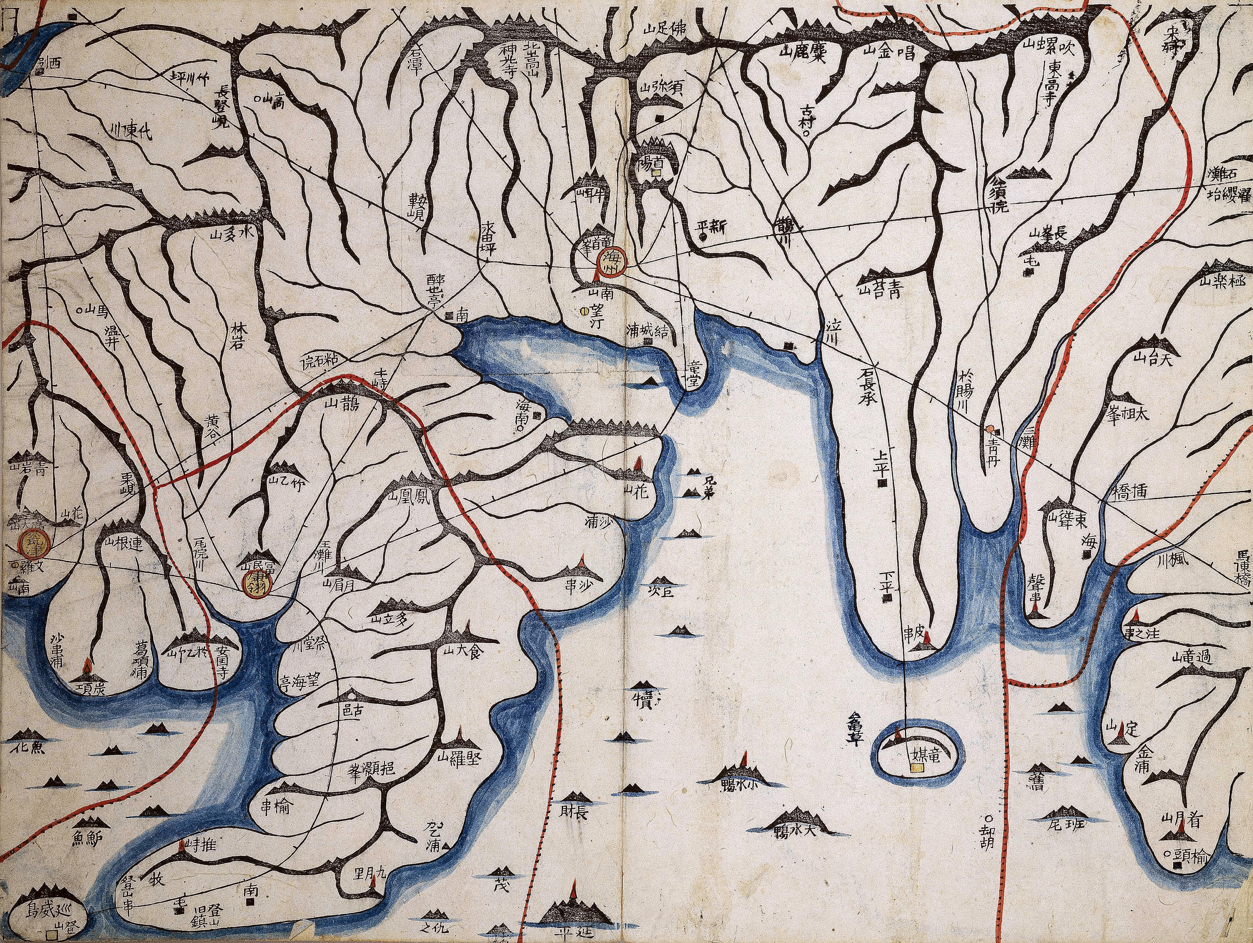 대동여지도